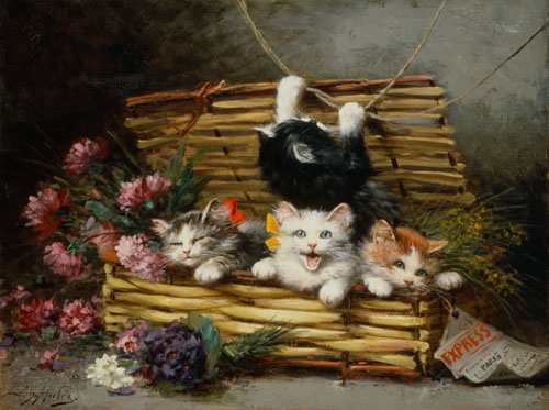 Une peinture de Léon Huber spécialiste de la représentation de chats domestiques.